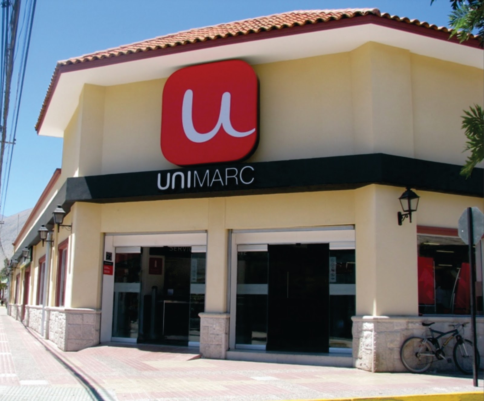 Supermercado Unimarc de Vicuña, valle de elqui